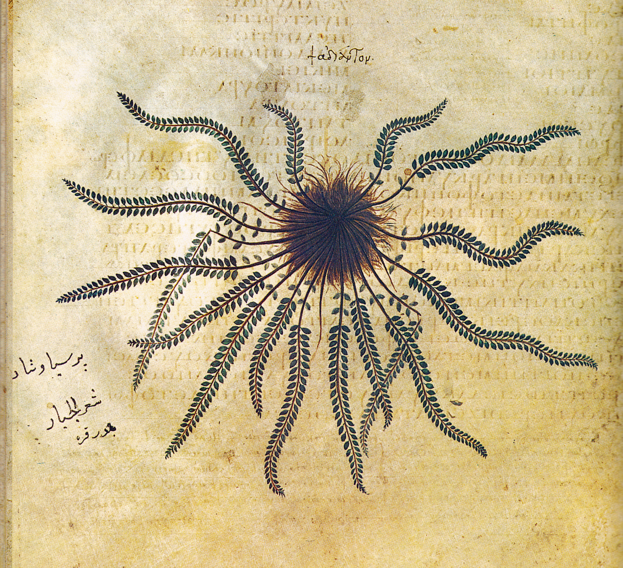 Abbildung des „adianton“ (Asplenium trichomanes)